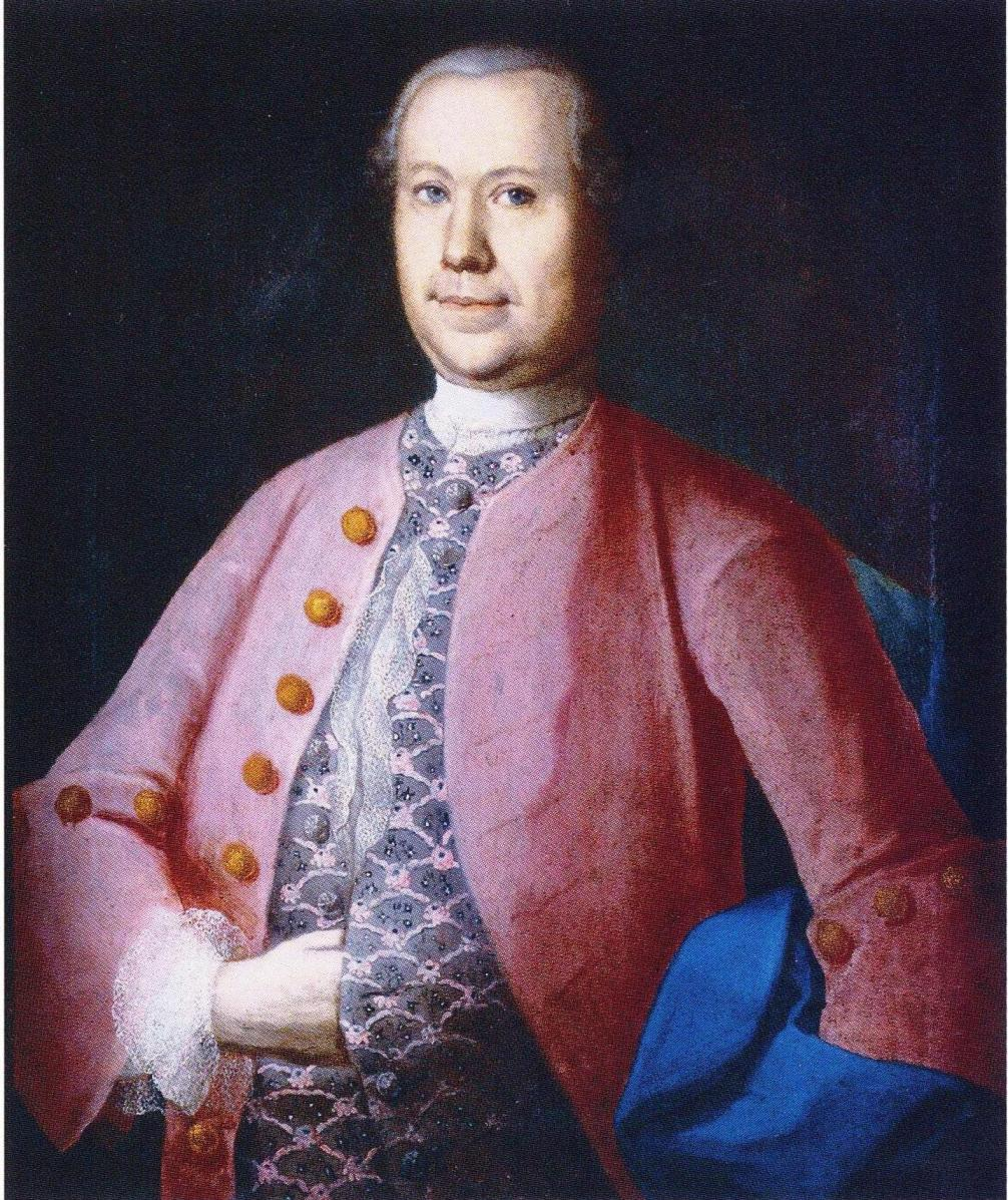 Kihlakunnantuomari ja valtiopäivämies Lorentz Anders Ekenberg (1724–1787). Geitel maalasi samassa yhteydessä muotokuvan myös hänen morsiamestaan Katarina Stenmanista.